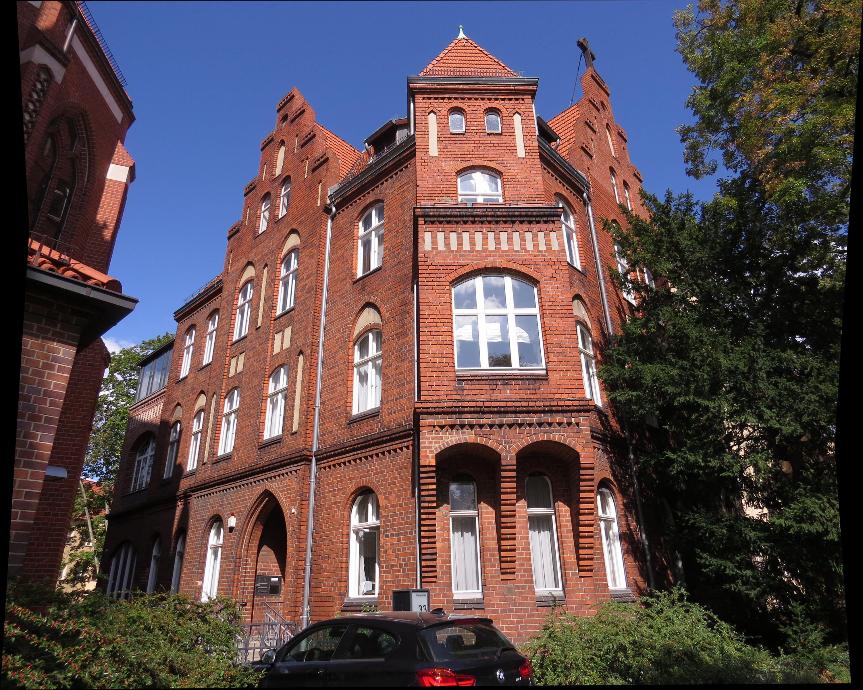 Kirche St. Georg, Berlin-Pankow, Pfarrhaus